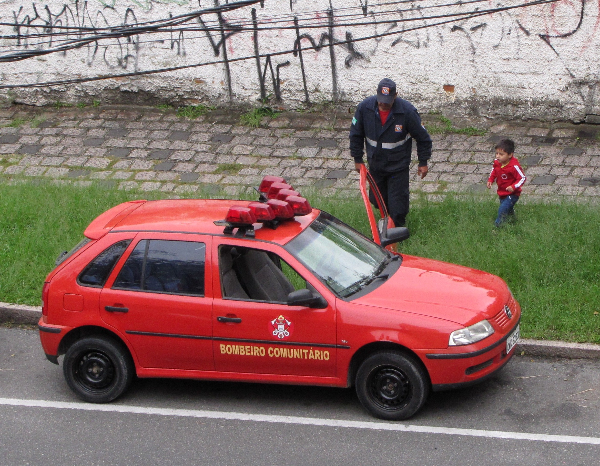 Viatura e uniforme de bombeiro comunitário no Paraná.